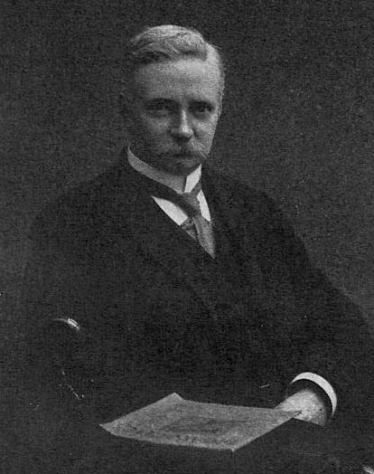 Гримм Давид Давидович